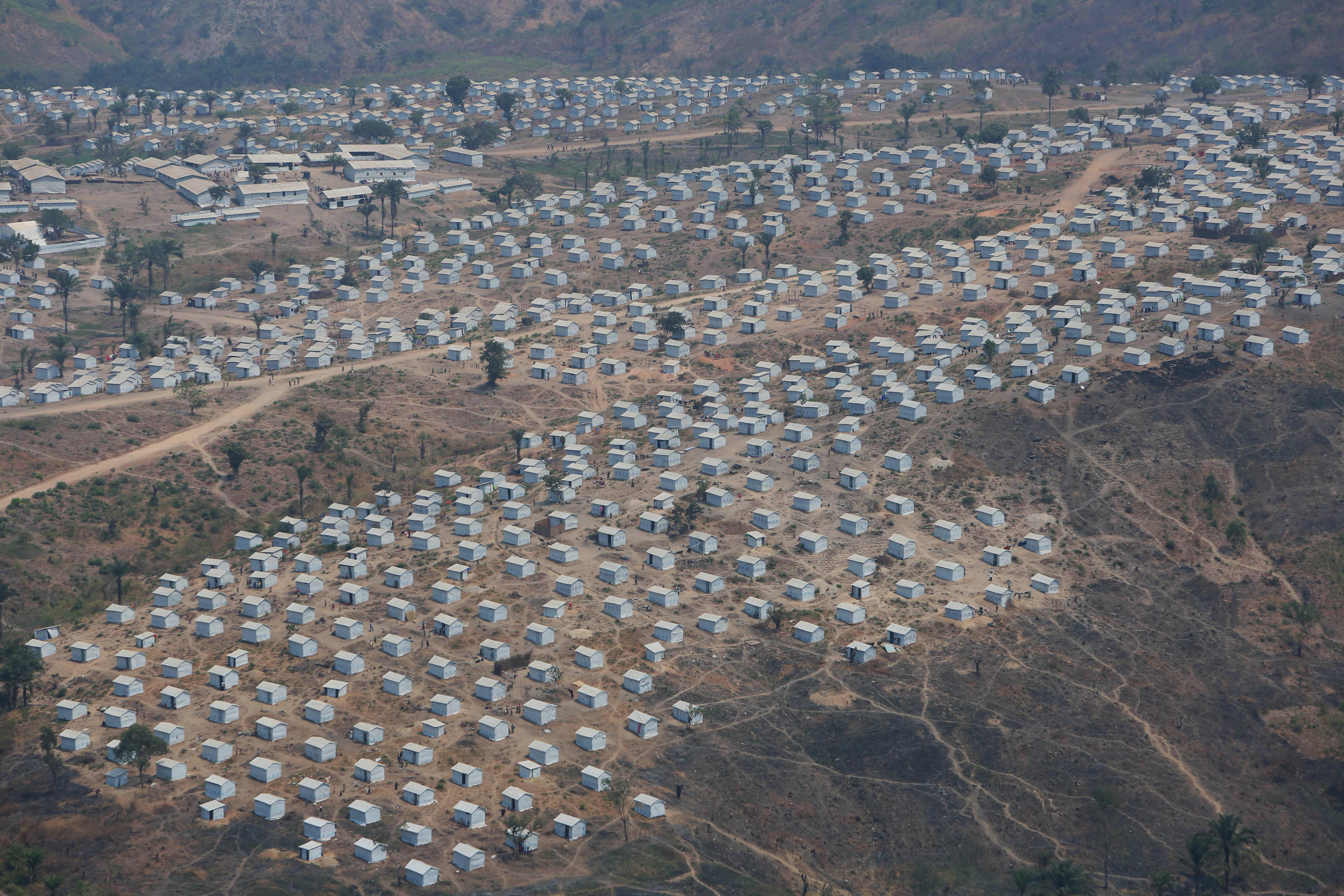 photo MONUSCO/Abel Kavanagh